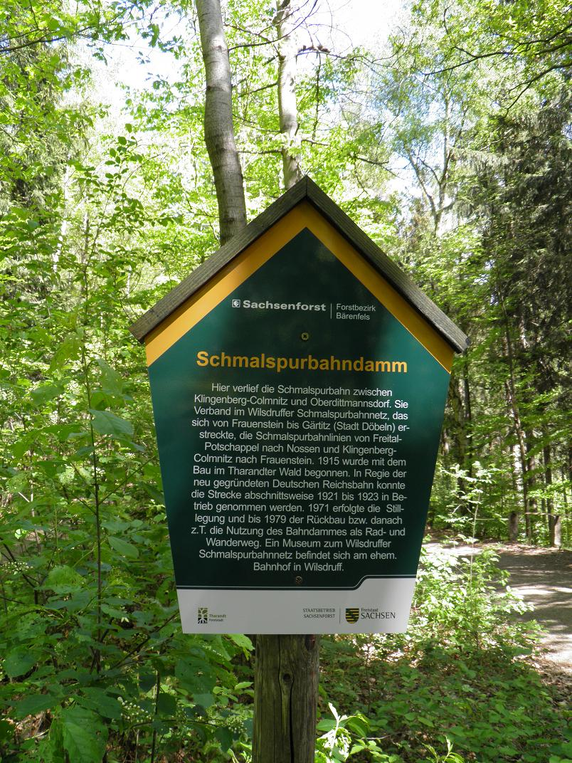 Hinweistafel zur Schmalspurbahnstrecke im Tharandter Wald